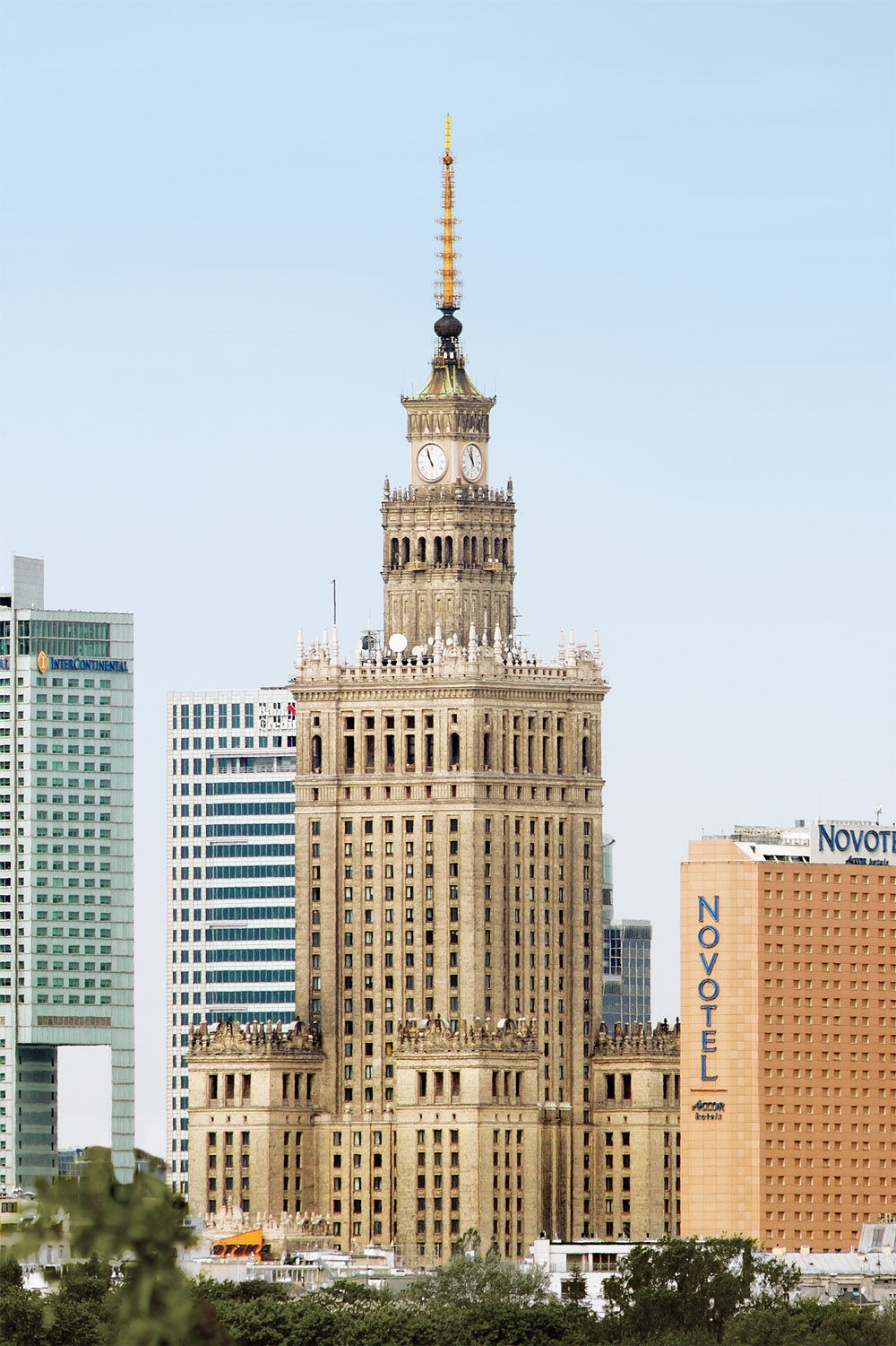 PKiN zbudowano w 1955 roku.